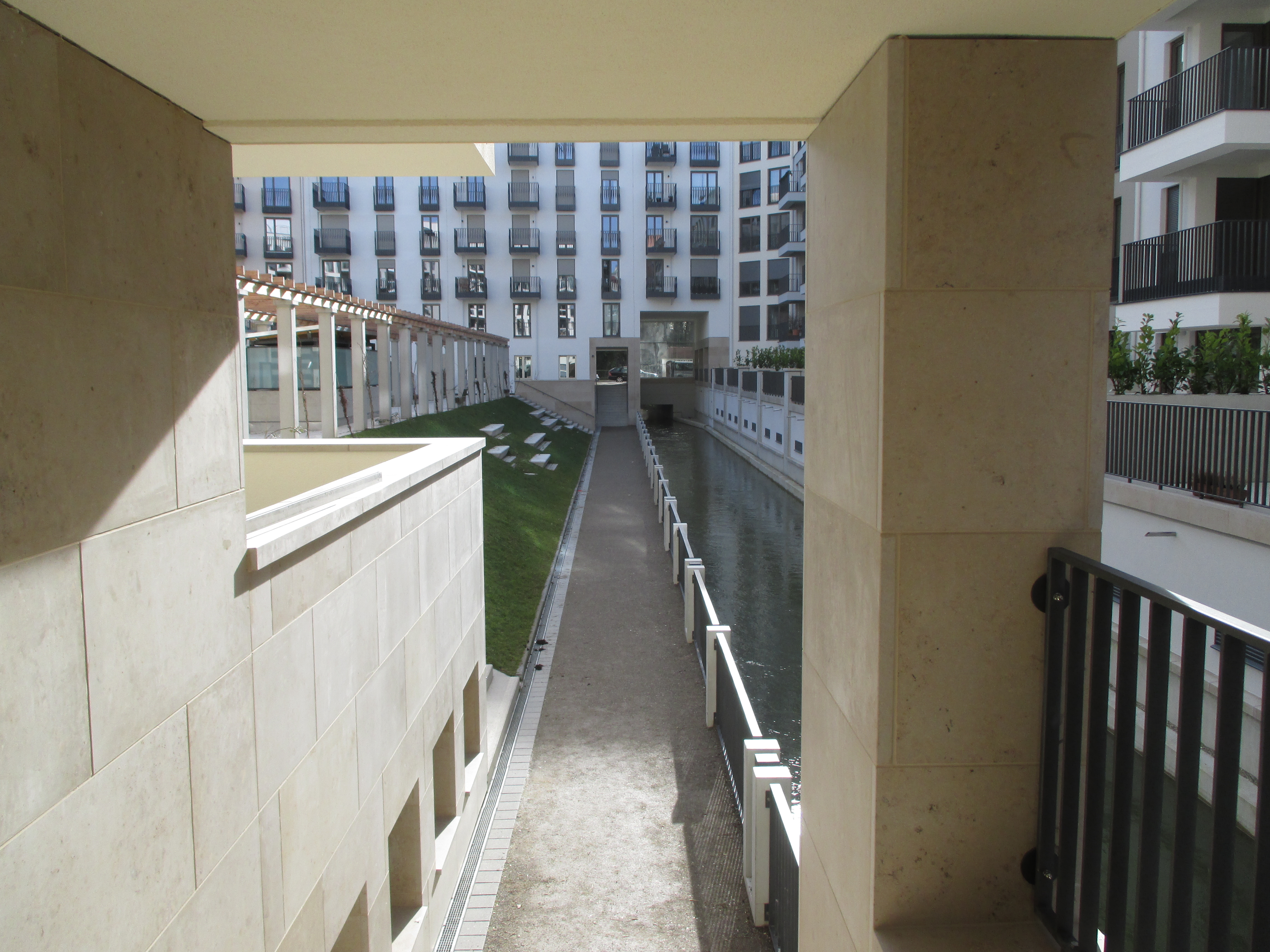 Freigelegter Westermuehlbach im Bereich des ehemaligen Rodenstockgelaendes jetzt mit Wohnbebauung 2016-02